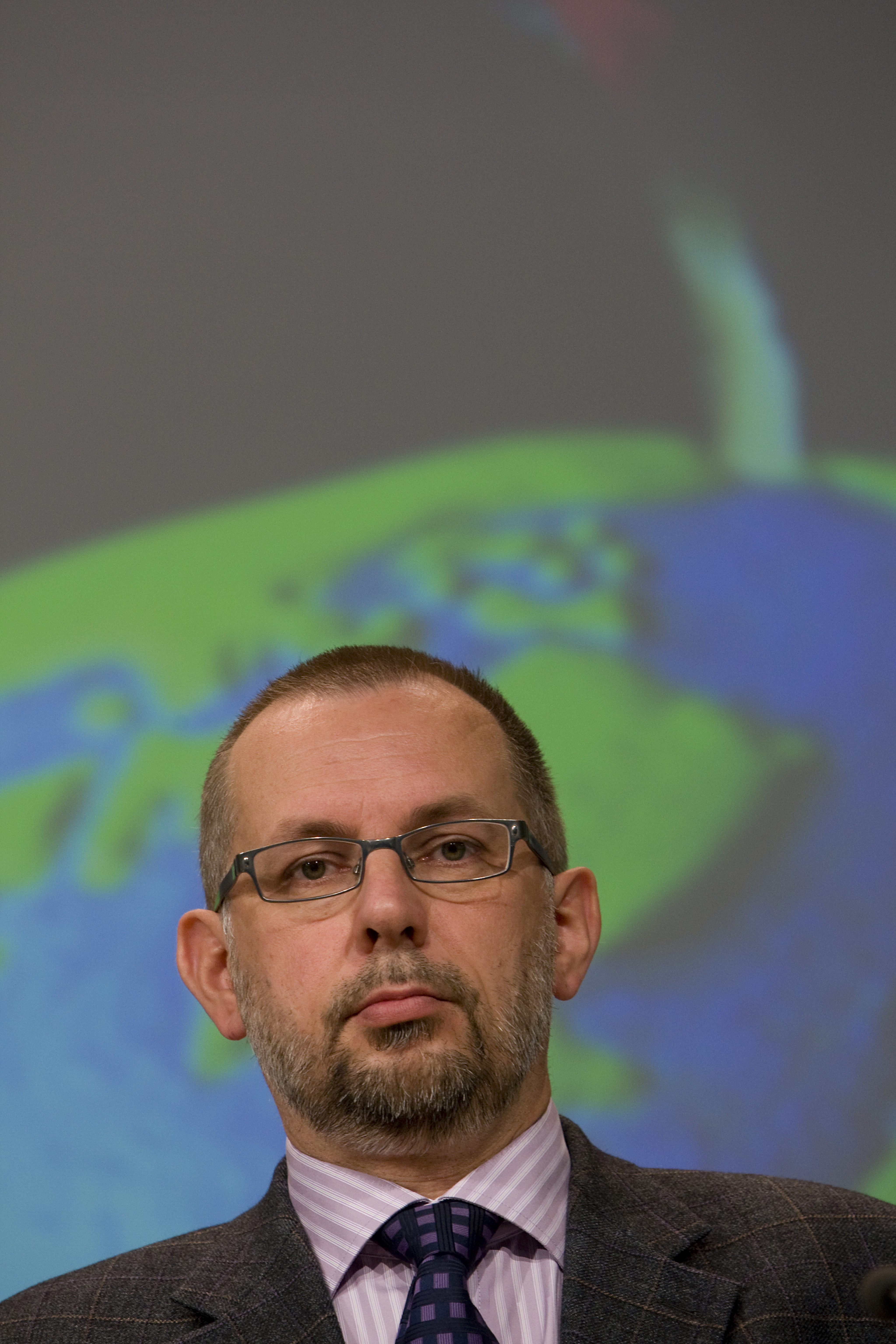 Ladislav Míko